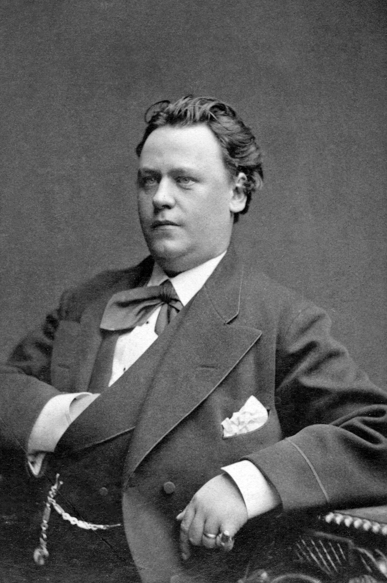 Victor Holmquist, skådespelare vid Nya teatern 1877